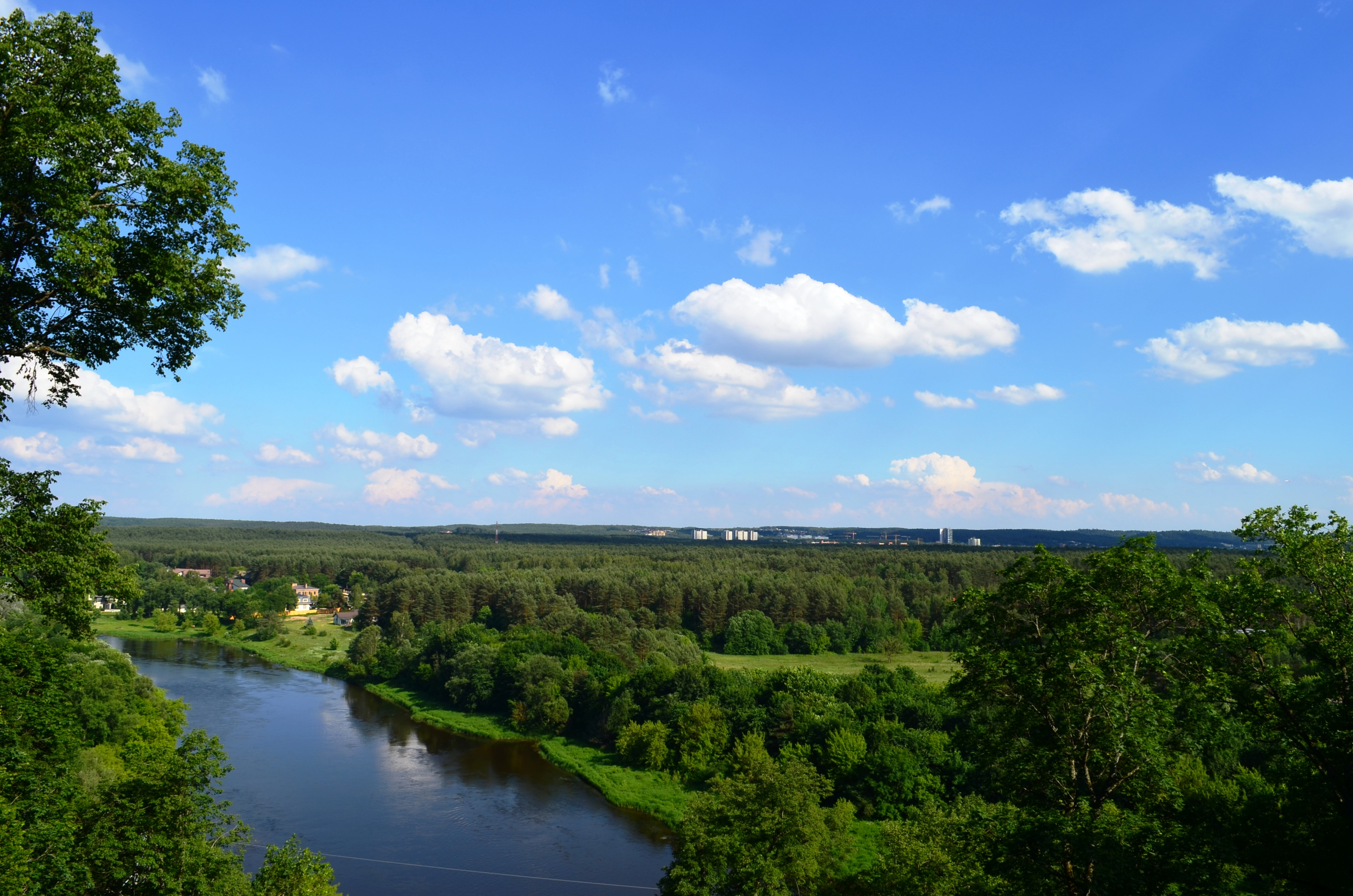 Vaizdas į Valakampių mišką ir Saulėtekį nuo Verkių rūmų, Vilnius